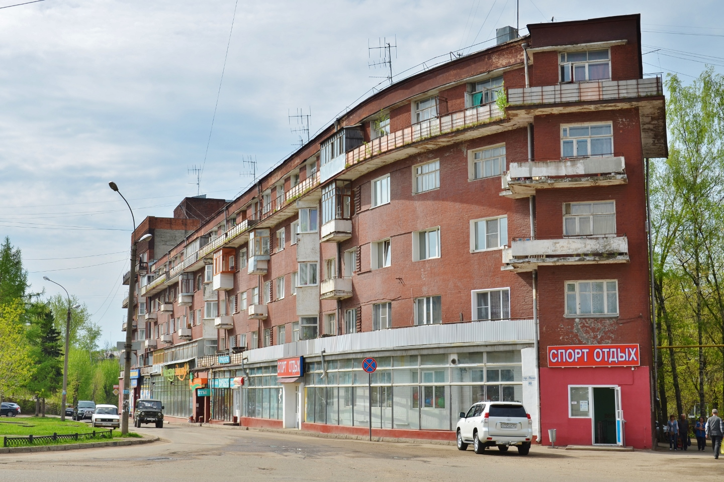 «Дом-корабль» жилищно-строительного кооперативного товарищества второго рабочего поселка, 1929 - 1930 гг., Д.Ф.Фридман (Ивановская область, Иваново, проспект Ленина, 49)